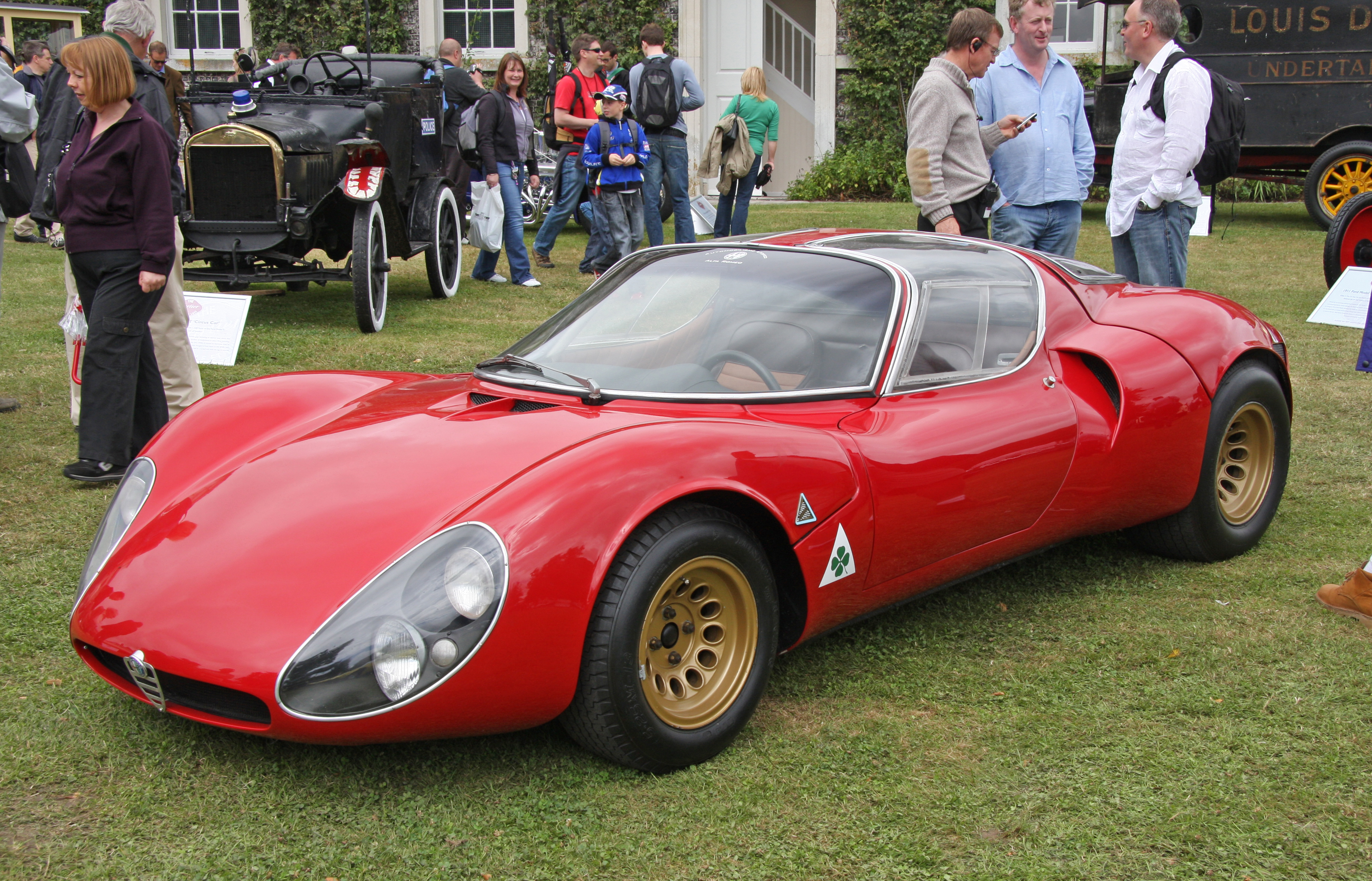 Alfa Romeo Tipo 33 Stradale Prototipo